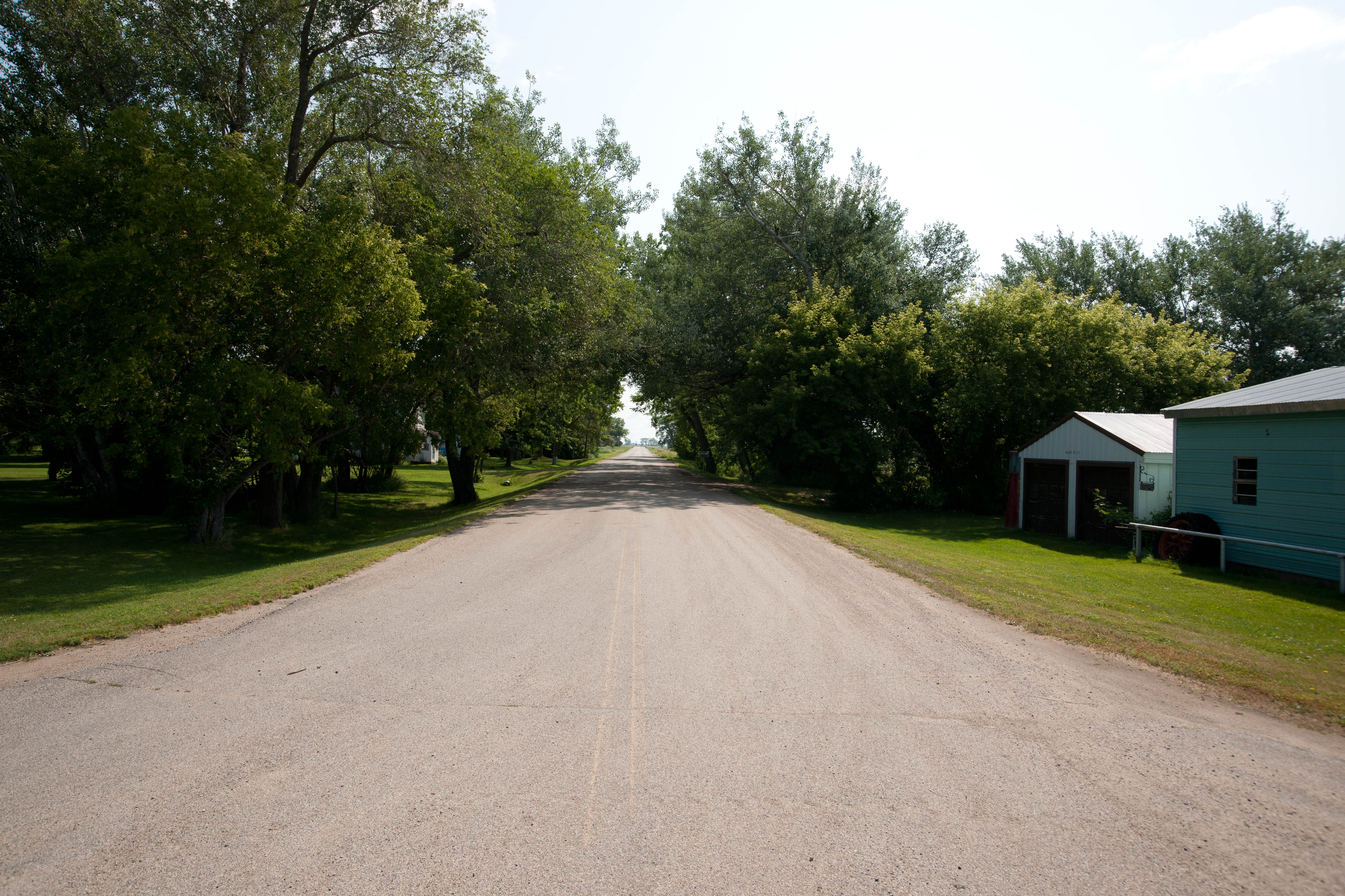 De Lamere, North Dakota